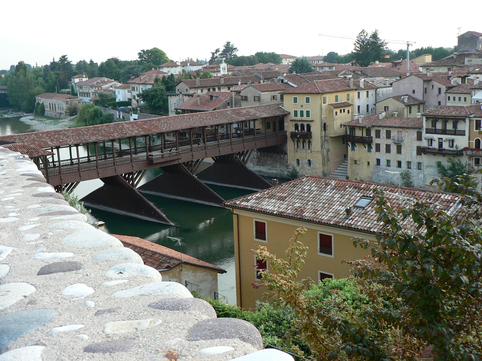 Die Ponte degli Alpini in Bassano del Grappa über die Brenta.